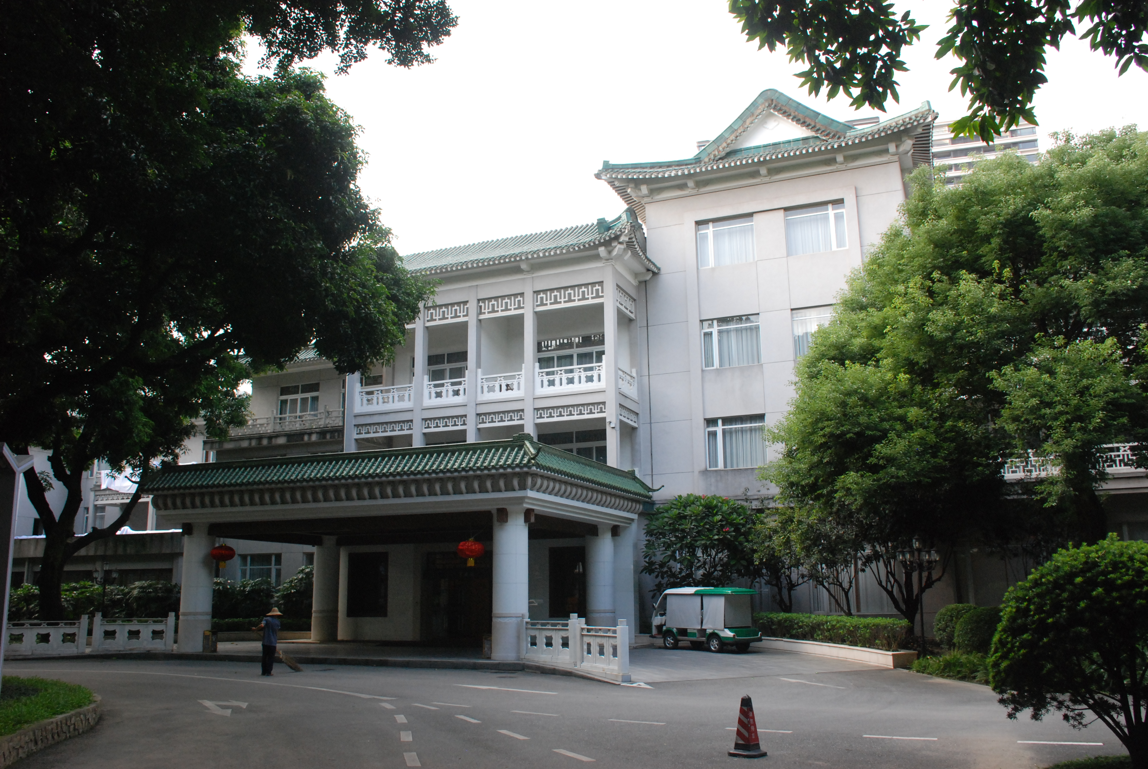 位于广东省广州市越秀区解放北路603号广东迎宾馆院内。